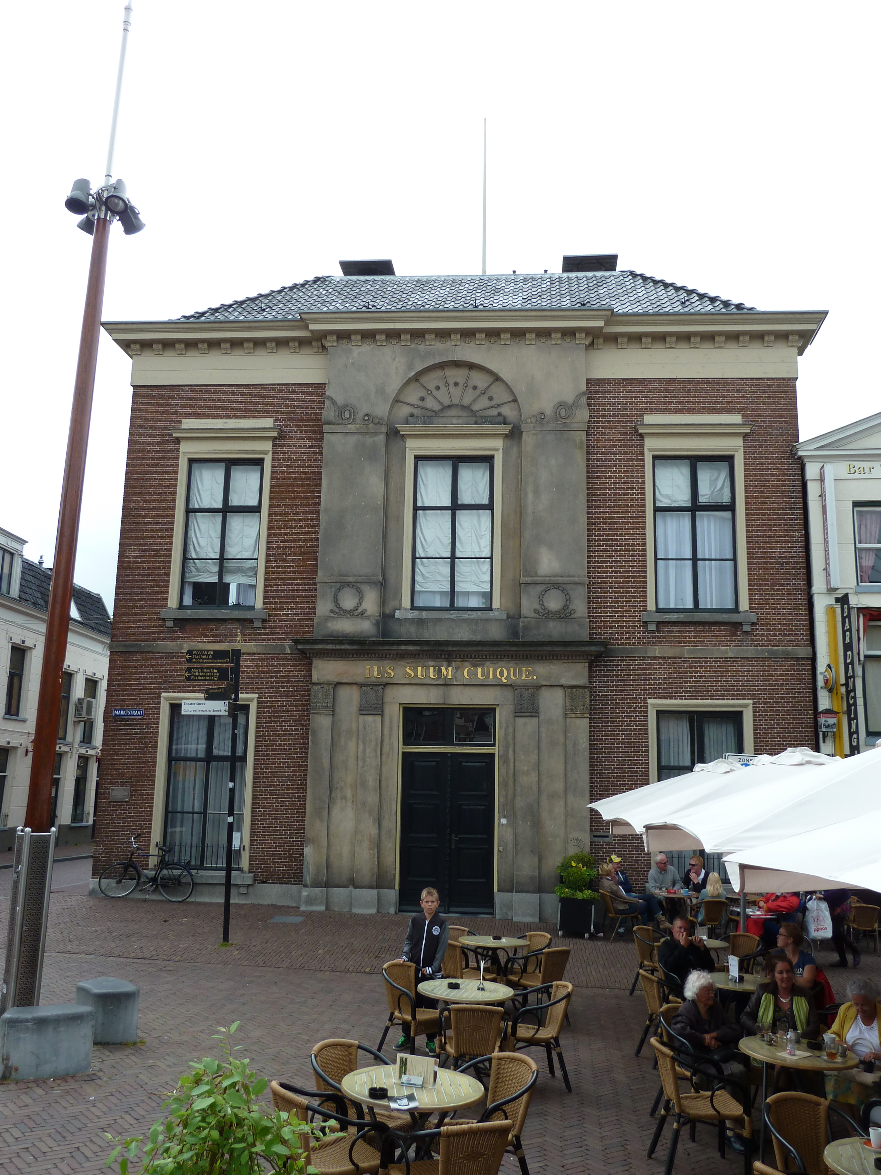 Marktstraat 27, Sneek: Justitiegebouw. In 1839 gebouwd, heeft een hardstenen classicistische gevel met Korintische pilasters.